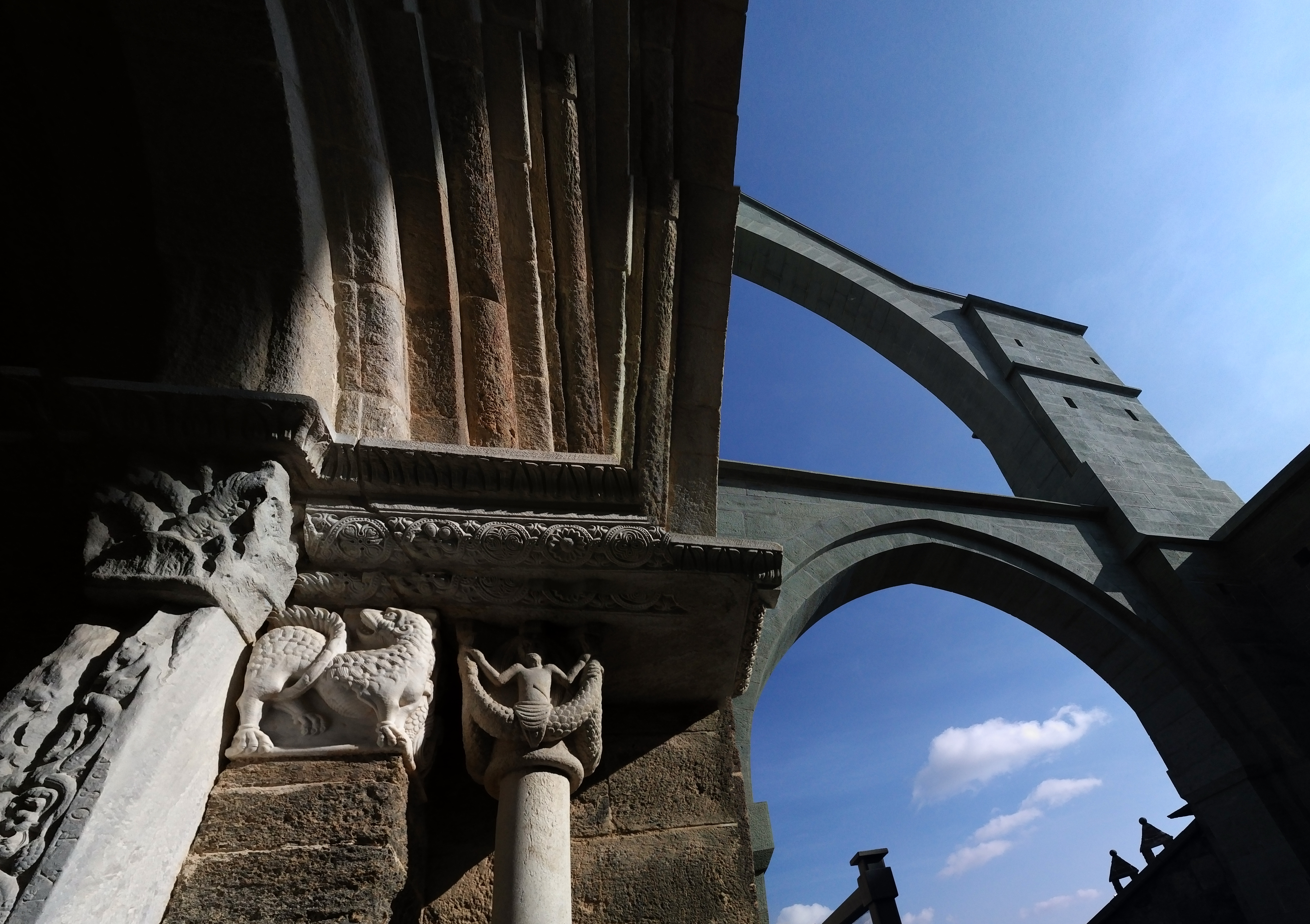 L’abbaye Saint-Michel-de-la-Cluse (Sacra di San Michele), février 2017.